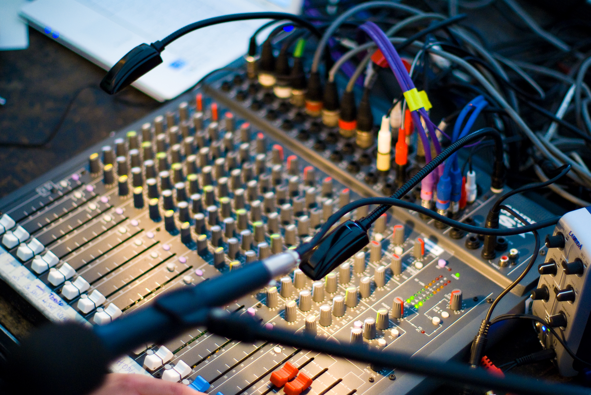 Livemischer vom Freien Radio Wüste Welle